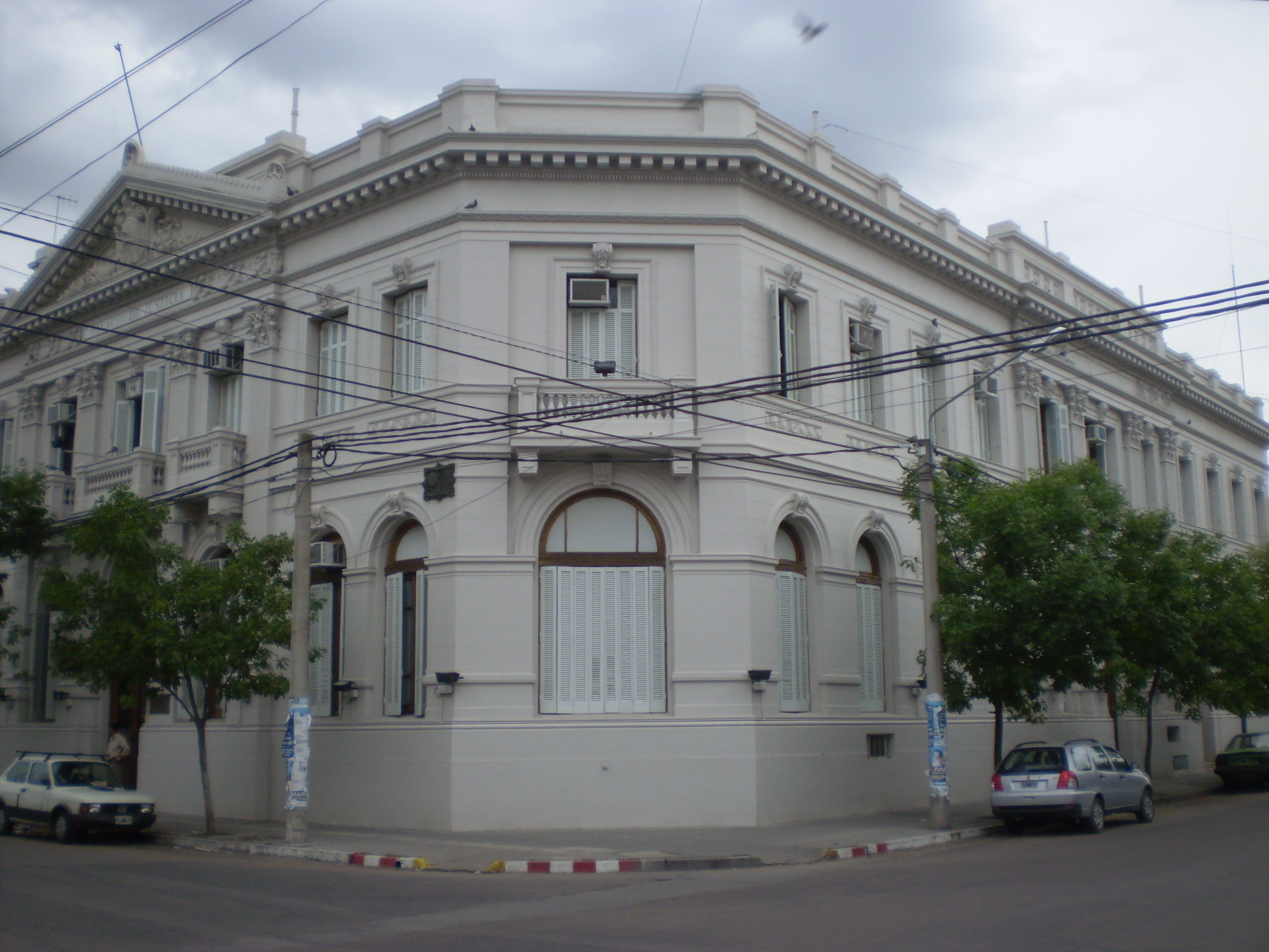 Justice Building (Carlos Massini, 1913-28). Santa Rosa, La Pampa, Argentina.